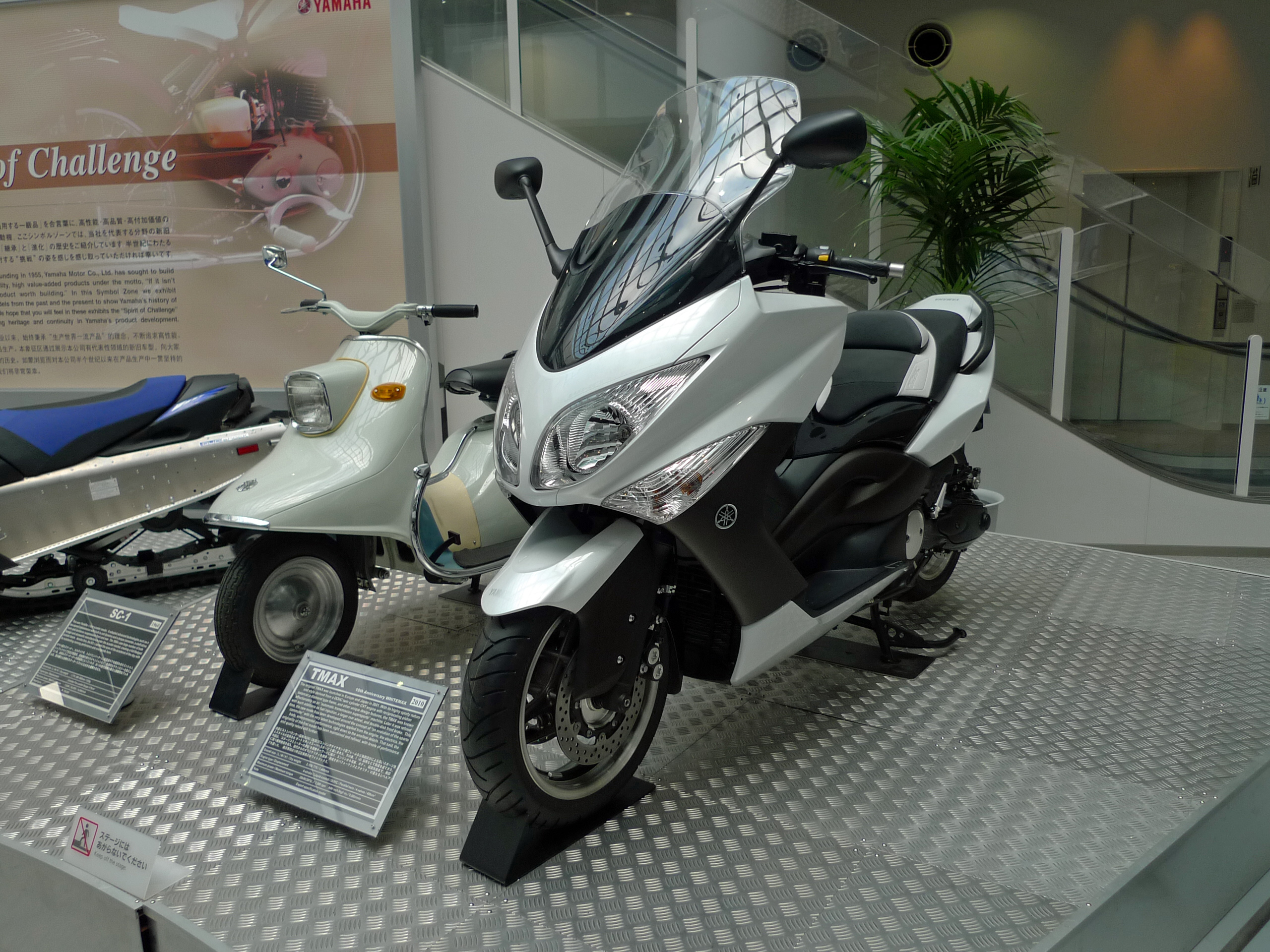 ヤマハ・TMAX（2010年） ヤマハコミュニケーションプラザにて撮影